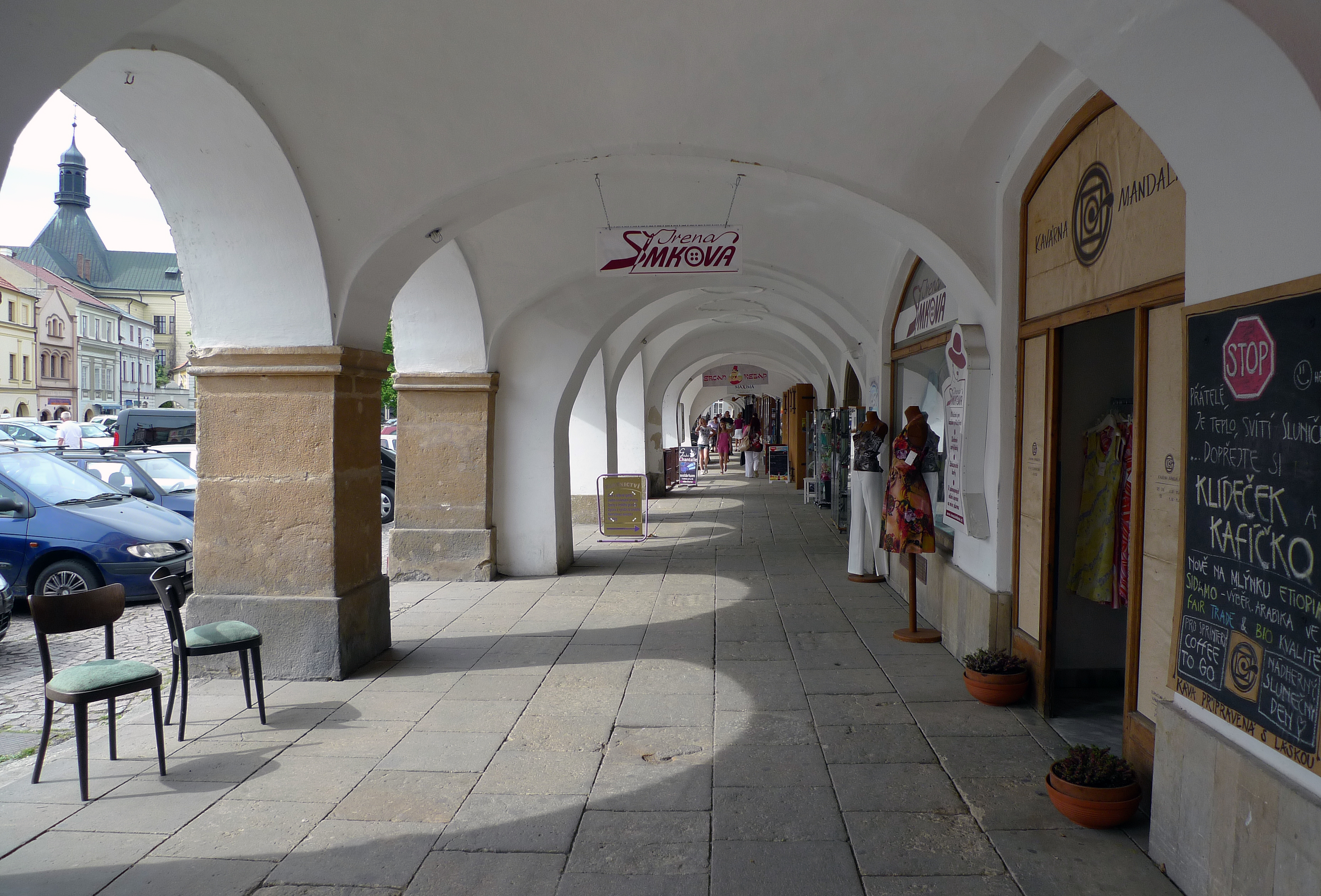 Podloubí na Smetanově náměstí v Litomyšli.